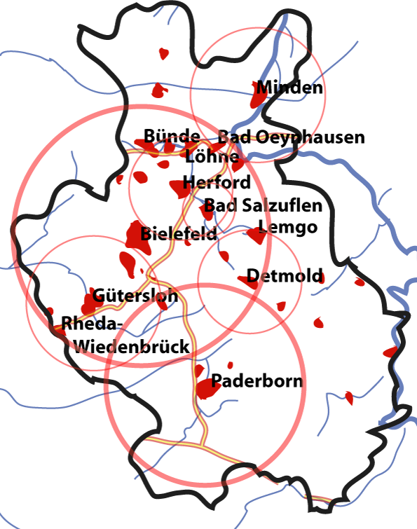 map of cities in Ostwestfalen-Lippe (North-Rhine-Westphalia) Germany